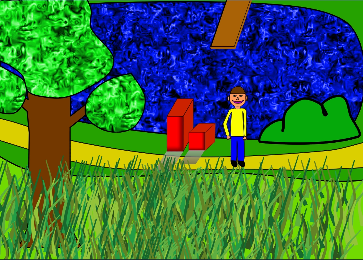 Ein Einzelbild aus einem mithilfe von Anime Studio erstellten Kurzfilm. Animation soll schlichte Teichszene darstellen, mit Baum, Strauch und Gras; einem Steg und einer Person.